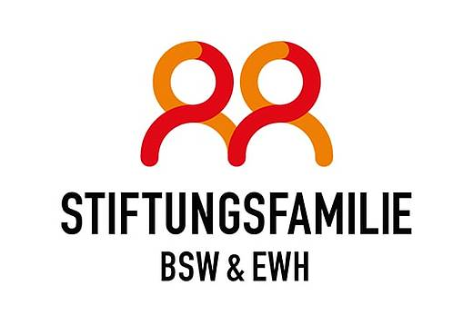 Logo Stiftungsfamilie BSW & EWH